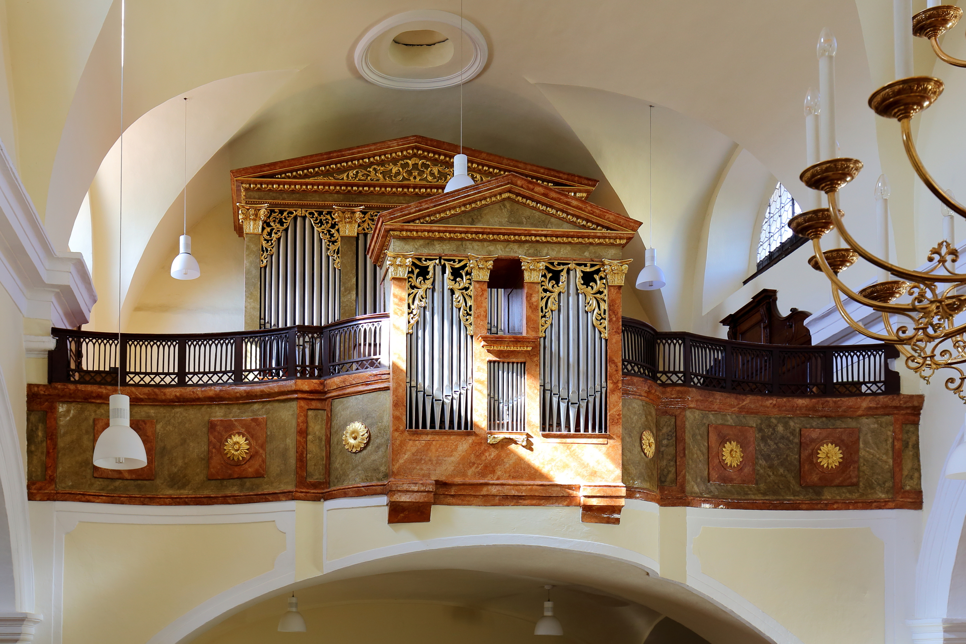 Orgel der katholischen Pfarrkirche hl. Martin in der niederösterreichischen Marktgemeinde Pillichsdorf.Die Orgel wurde im Jahr 1847 von Josef Loyp gefertigt und im Jahr 1973 von Philipp Eppel umgebaut. Die Orgel mit Schleifladensystem, mechanischer Spiel- und Registertraktur hat 16 Register und zwei Manuale sowie Pedal.